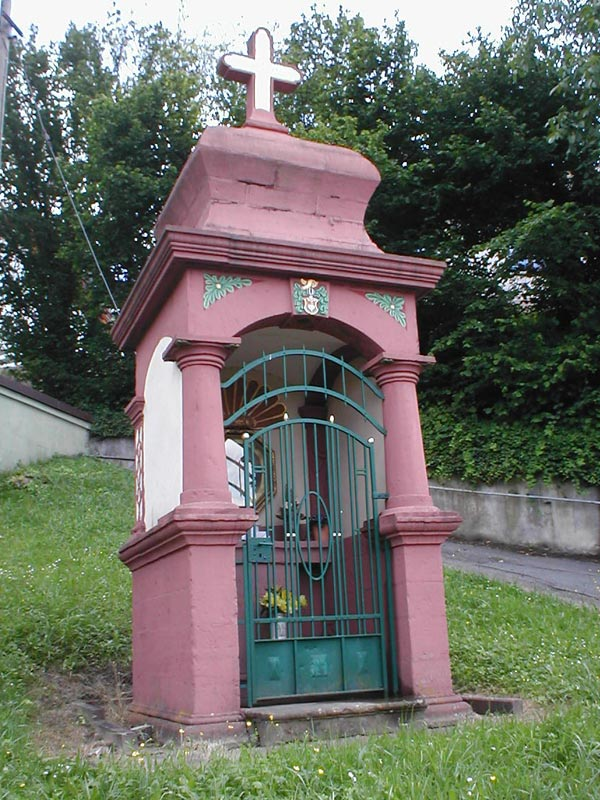 Marienaltar in Waibstadt